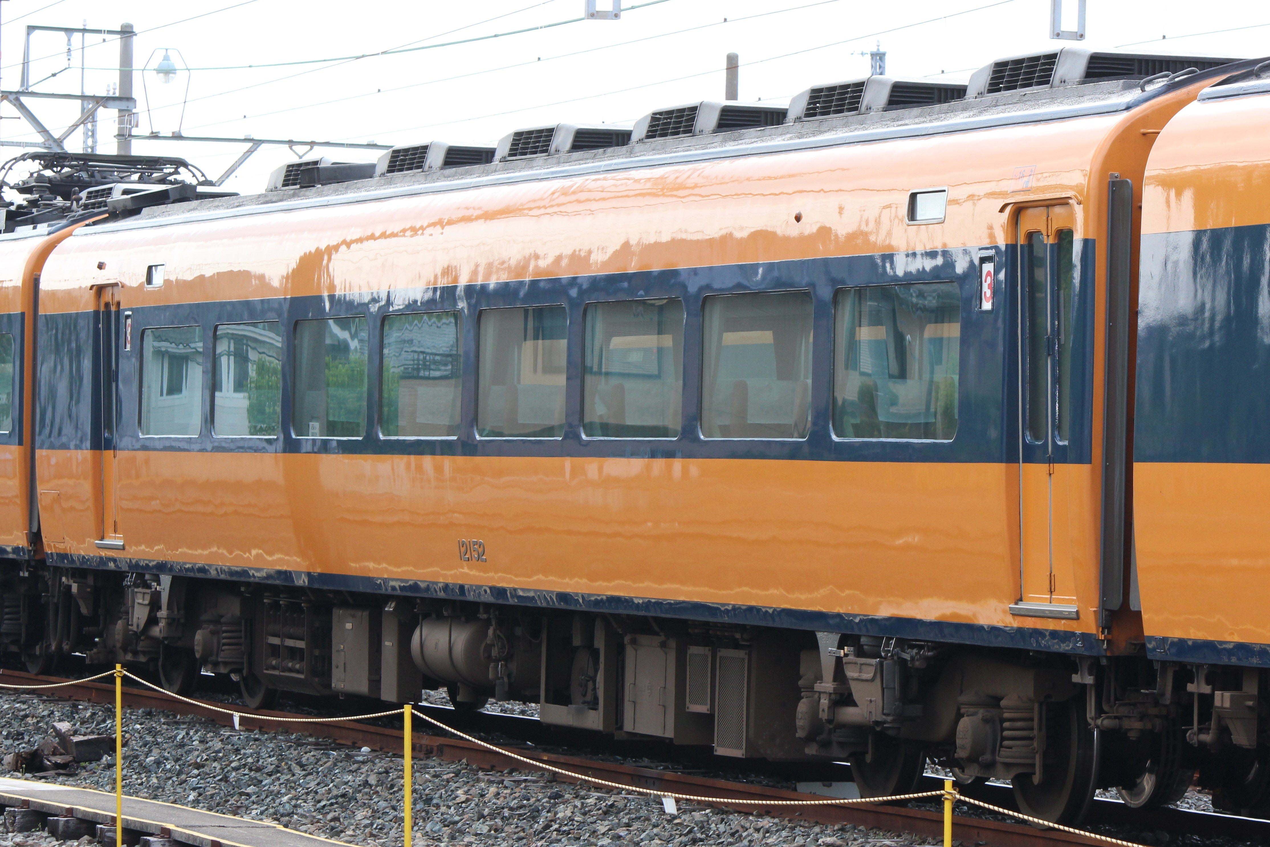 近鉄12200系 サ12552